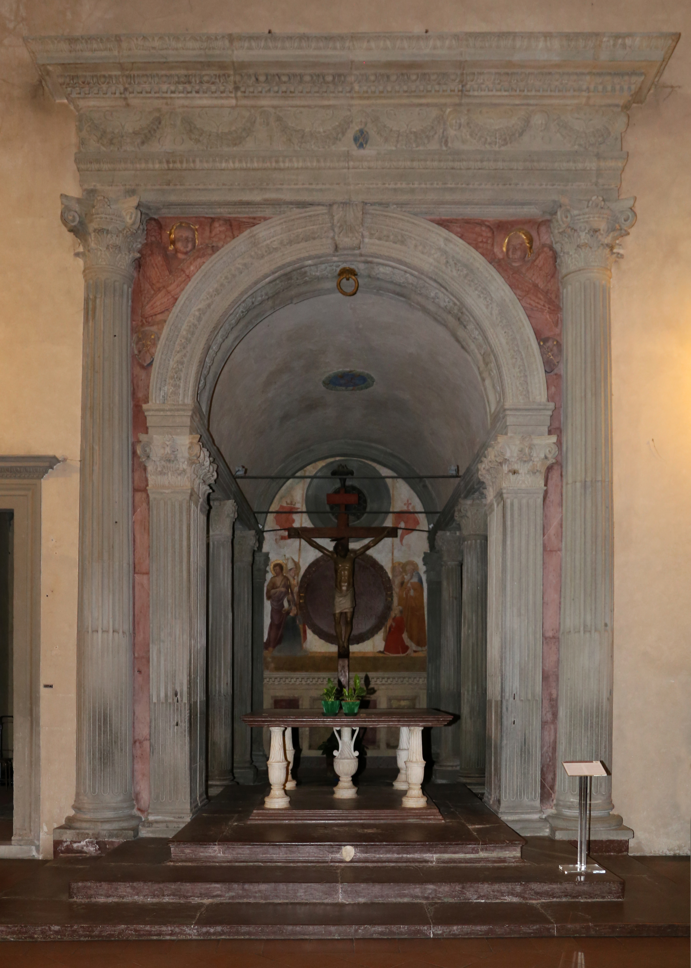 Chiesa di San Francesco This is a photo of a monument which is part of cultural heritage of Italy.